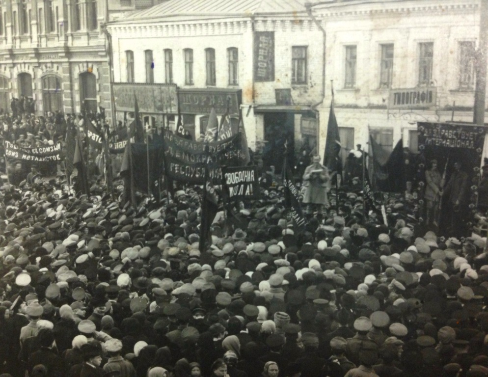 Митинг в 1917 г., в Иванове во время Февральской революции (проспект Ленина).